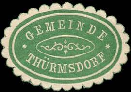 Sealing stamp Title: Gemeinde Thürmsdorf Description: grün, weiß, geprägt Place: Thürmsdorf size: 3x4 cm